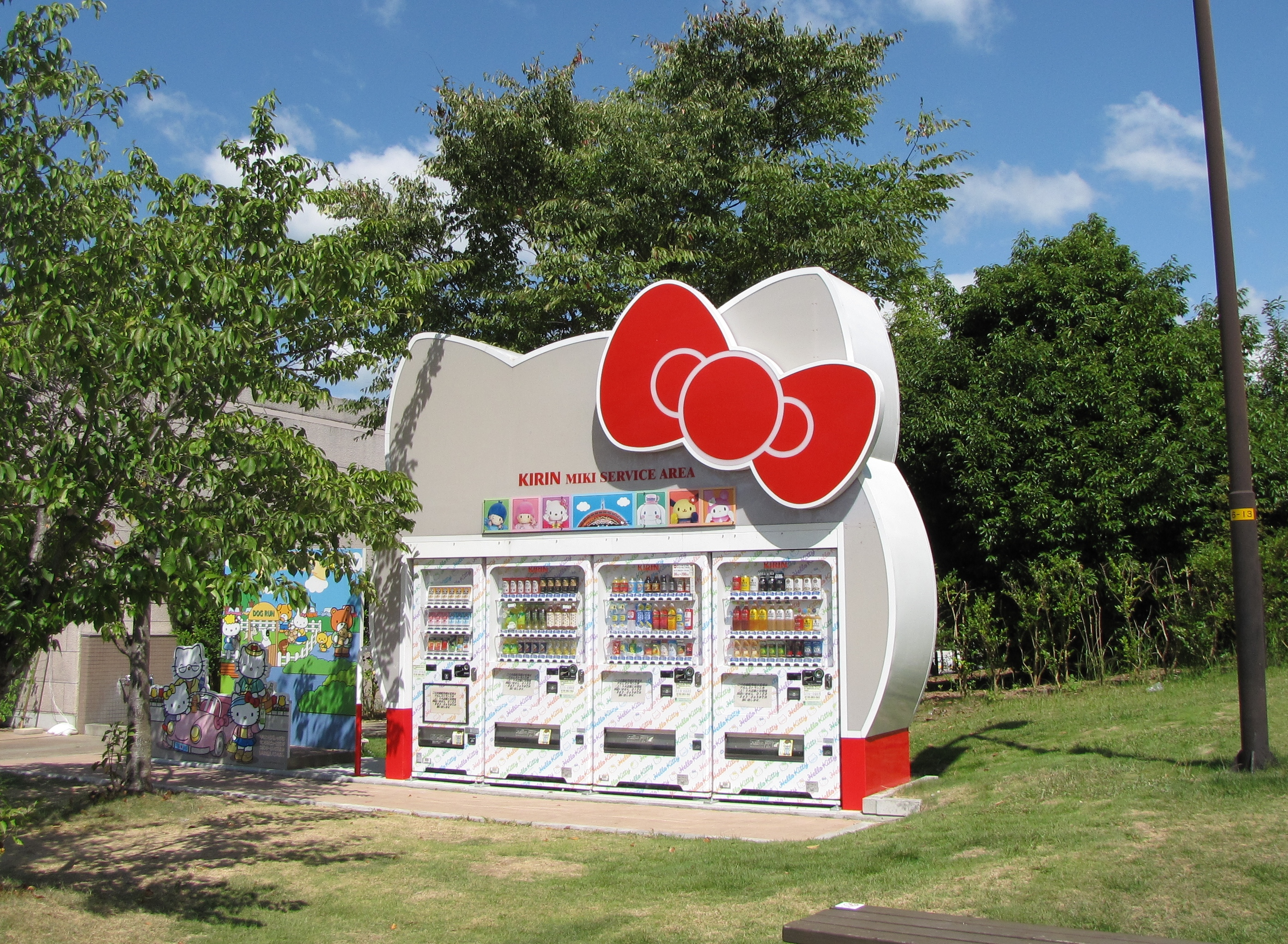 サンリオ、キリンビバレッジ、NEXCO西日本の３社によるコラボレーションハローキティ自動販売機。山陽自動車道三木サービスエリアの設置自動販売機。